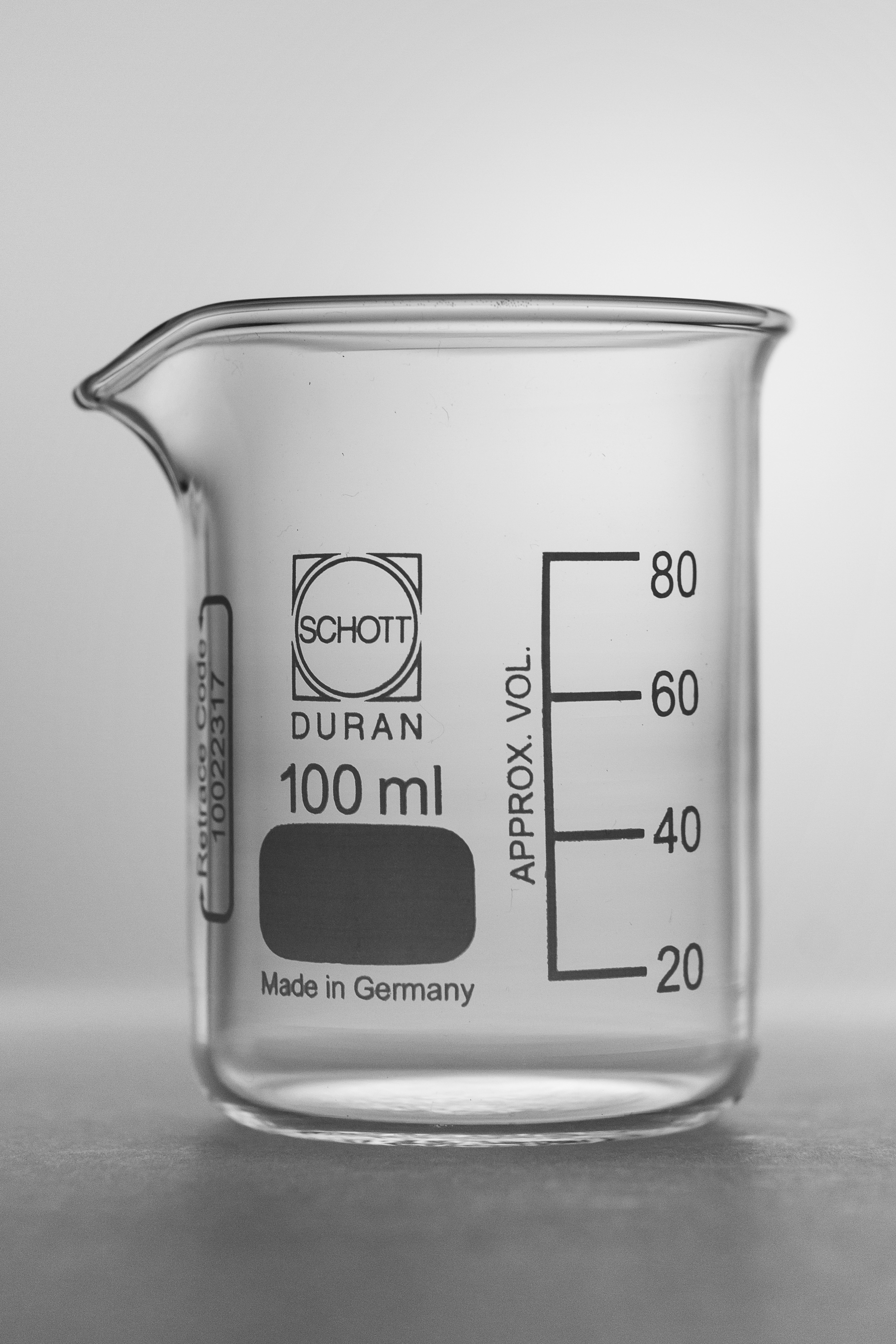 Duran Becherglas 100ml niedrige Form